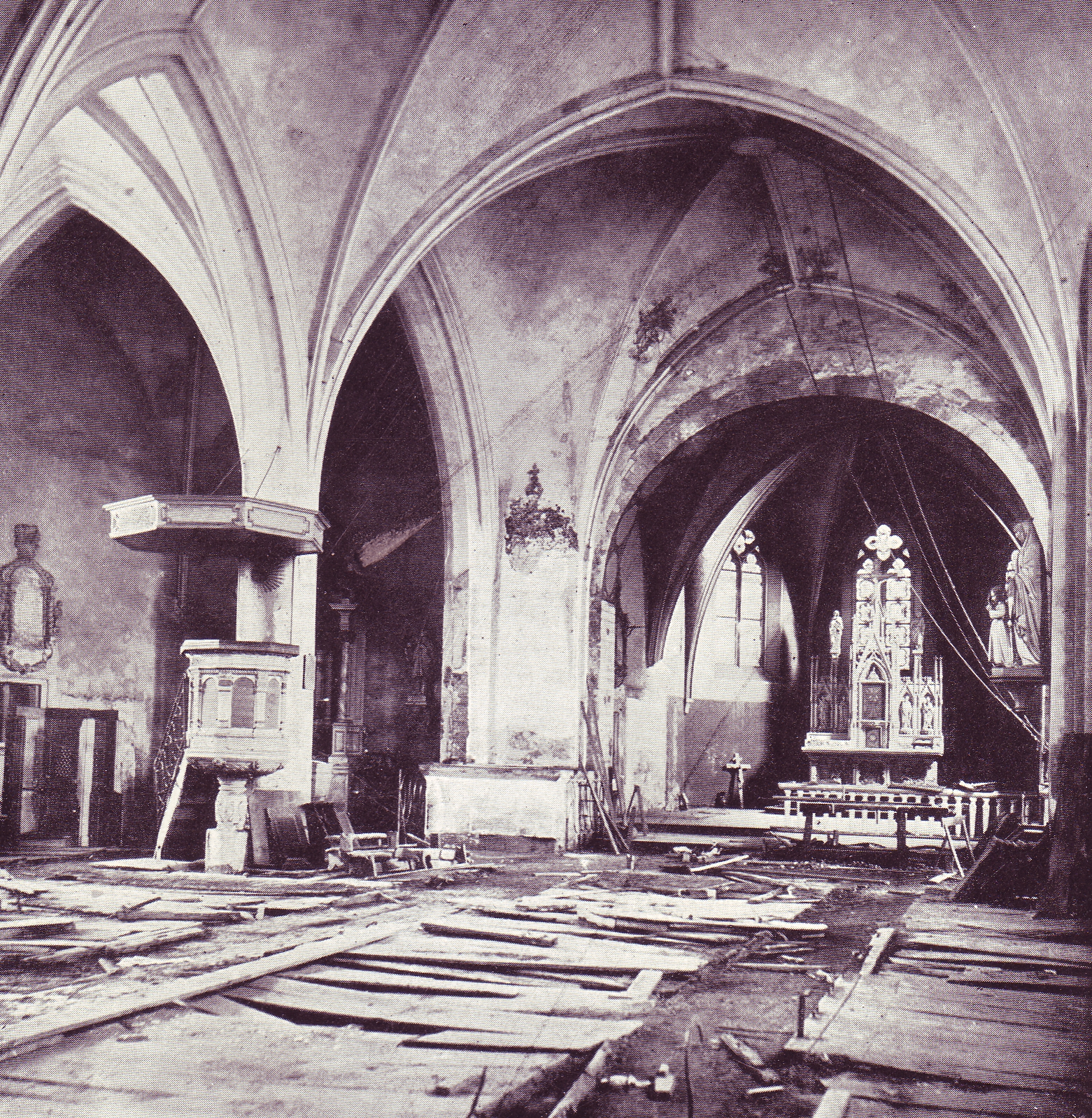 Stiftskirche Borghorst, 1885 abgerissen